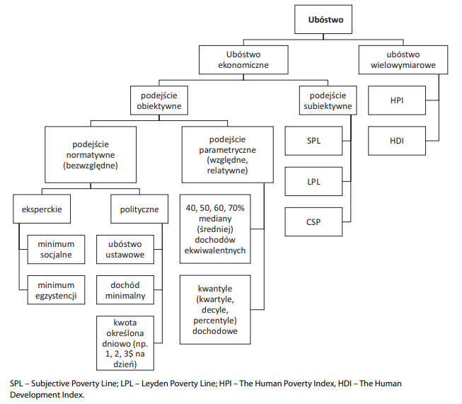 Autor: S. Kalinowski Żródło: (2015). Poziom życia ludności wiejskiej o niepewnych dochodach. WN PWN